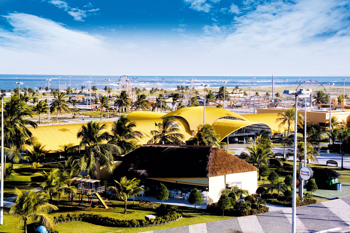 Foto: Prefeitura Municipal de Aracaju